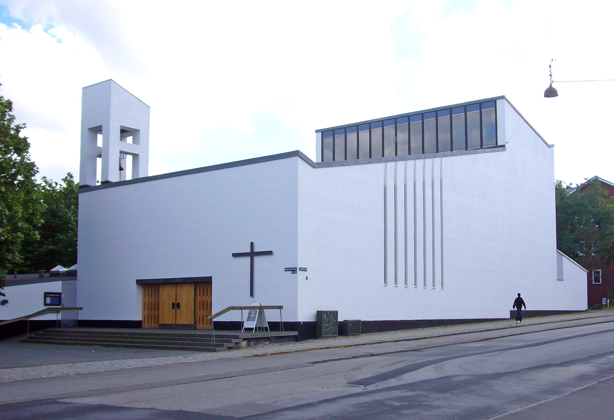 Utterslev Kirke, Copenhagen, Denmark. Utterslev Kirke